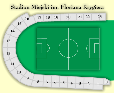 Plan sektorów Stadionu Miejskiego w Szczecinie. kategoria:grafiki własnego autorstwa